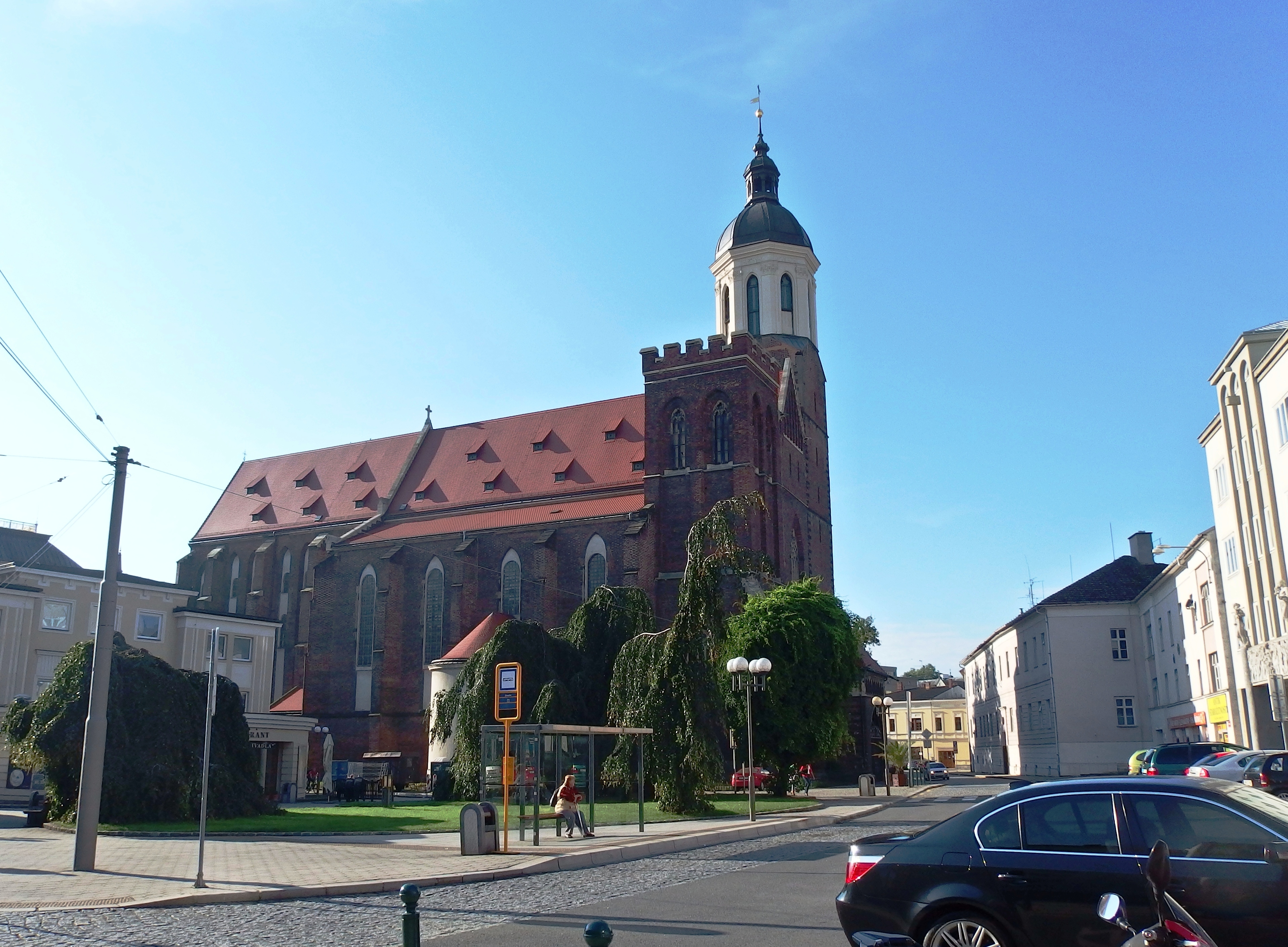 Konkatedrála Nanebevzetí Panny Marie, Rybí trh, Opava-Město, Opava.